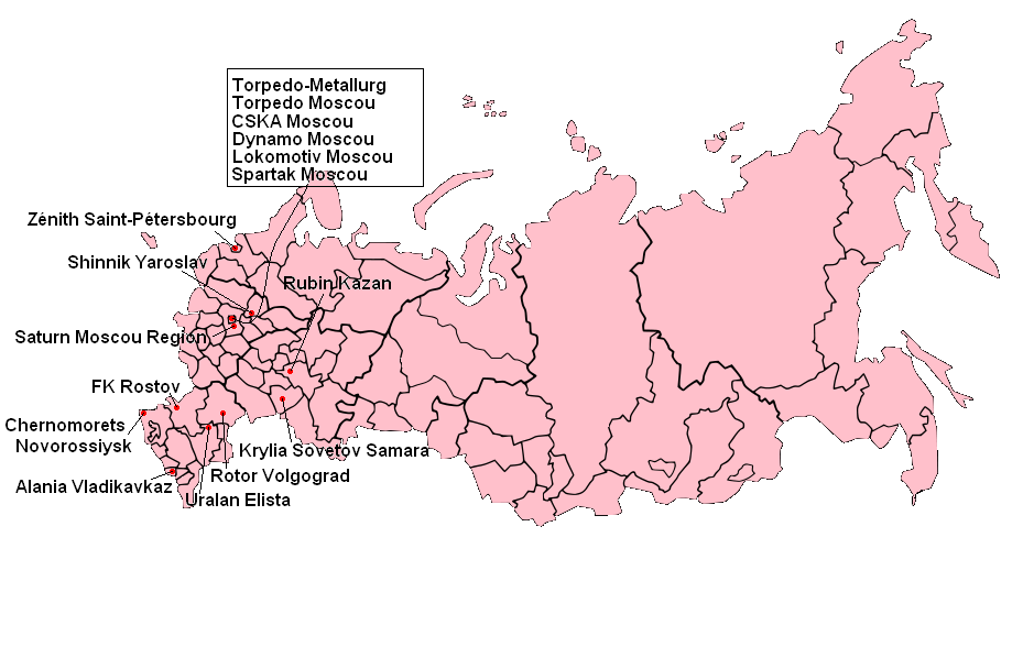 Participants à la Premier League 2003.